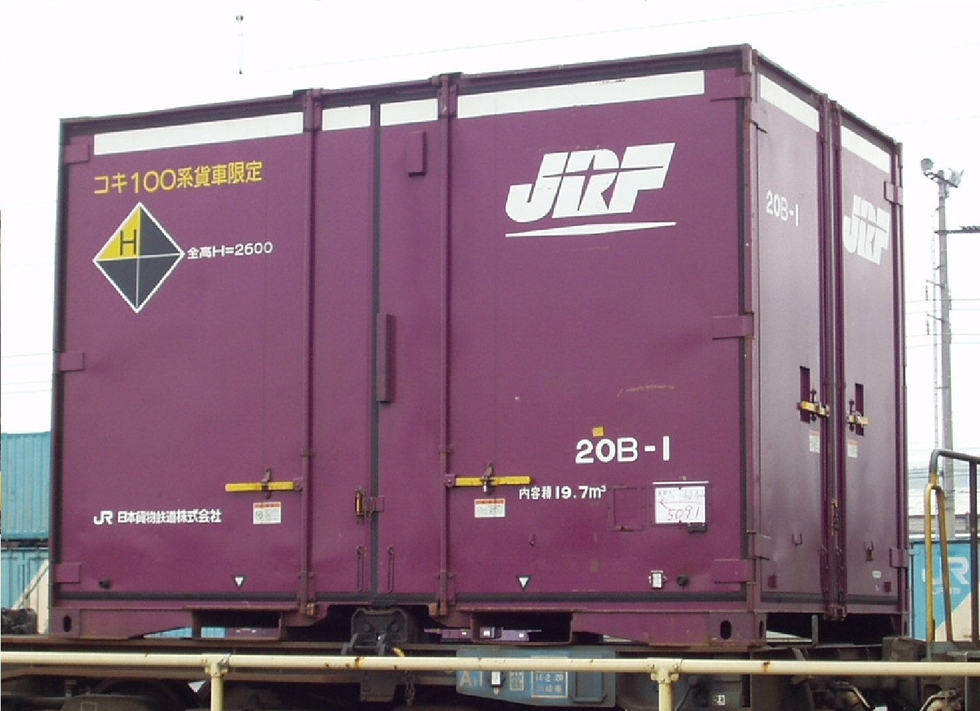 撮影地＝【岡山／旧、西岡山貨物駅】